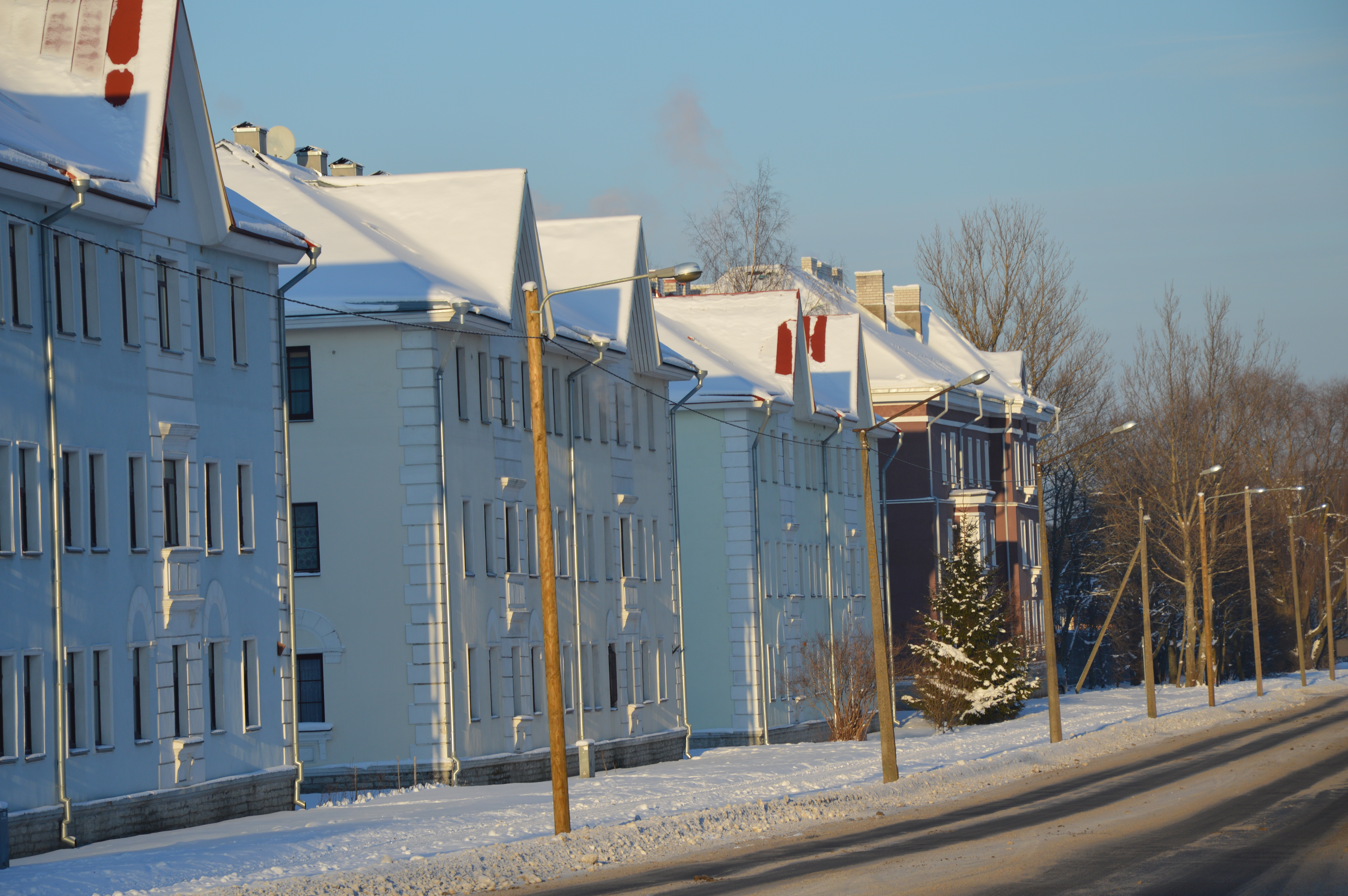 Renoveeritud ehitised Kotka tänaval